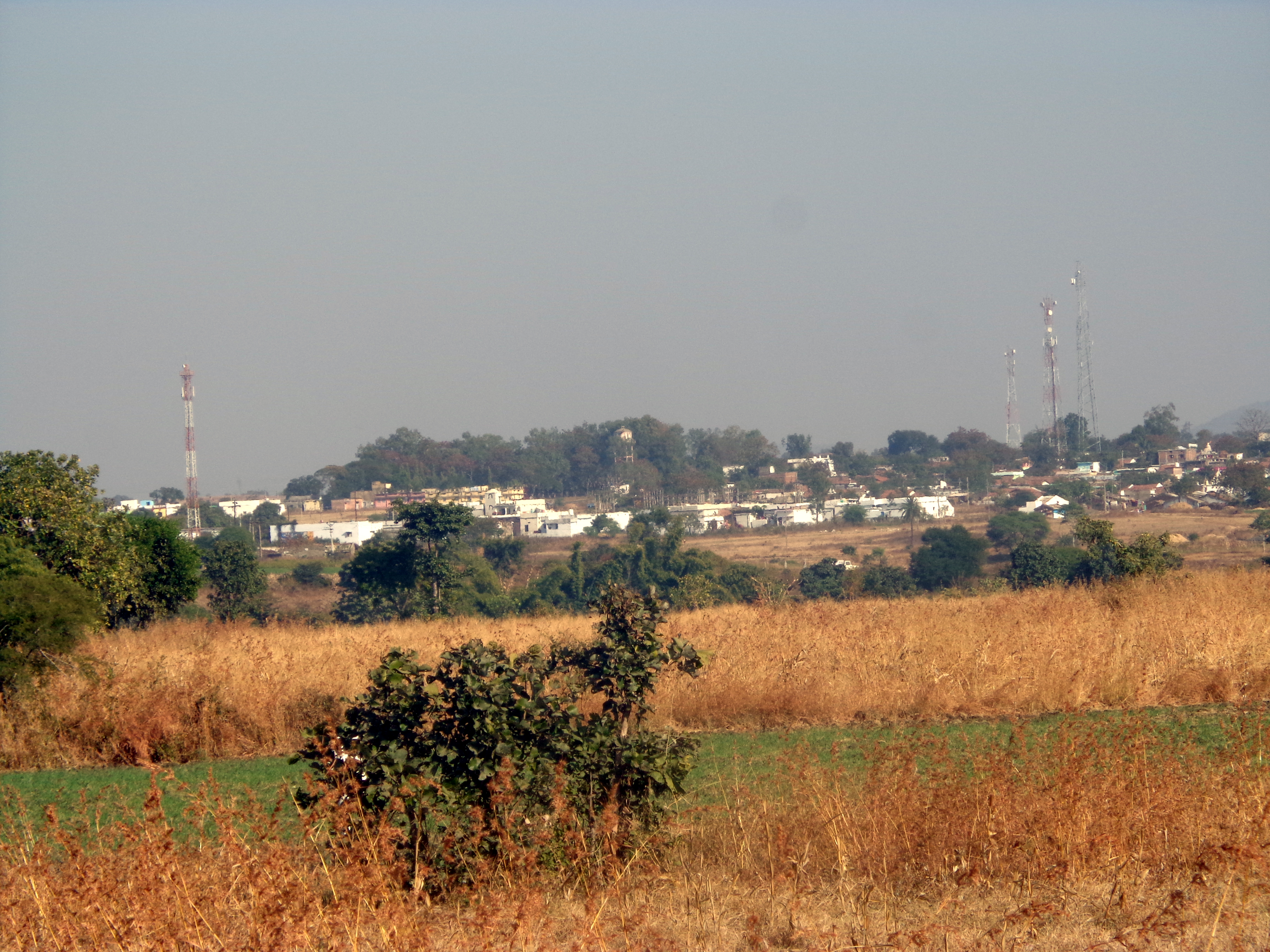 hi:बंडोल: बंडोल का दूर का विहंगम दृश्य